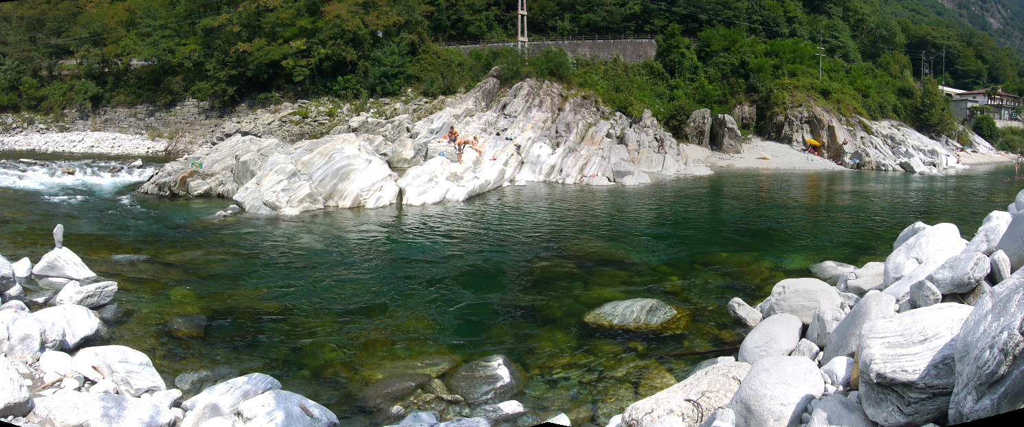 Natural Swimming Pool